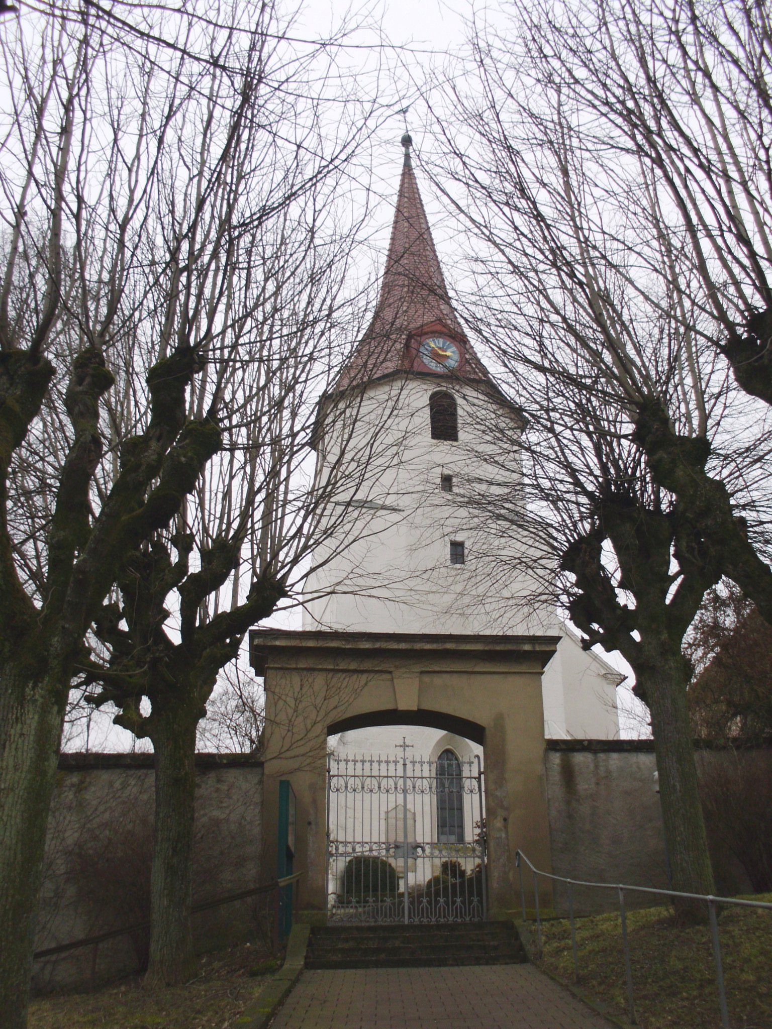 Stetten, Ortsteil von Gunzenhausen im mittelfränkischen Landkreis Weißenburg-Gunzenhausen (Bayern), Evangelisch-lutherische St. Peterskirche